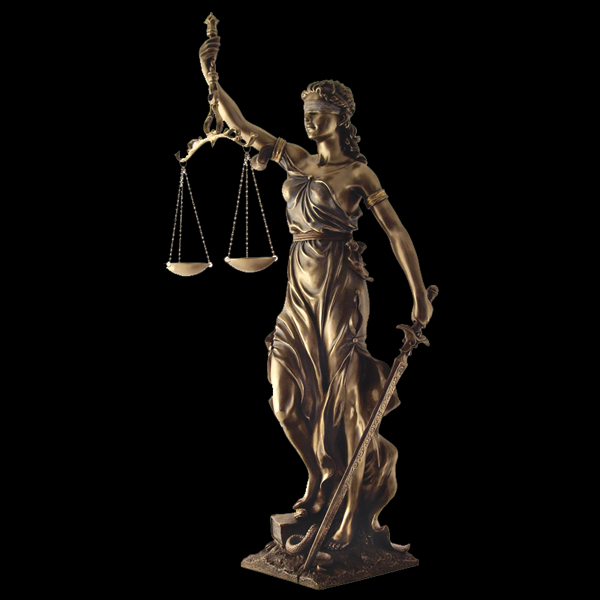 Imagen de metal de una mujer que está vendada por los ojos y que sostiene en una de sus manos una balalanza y en la otra una daga en señal de justicia